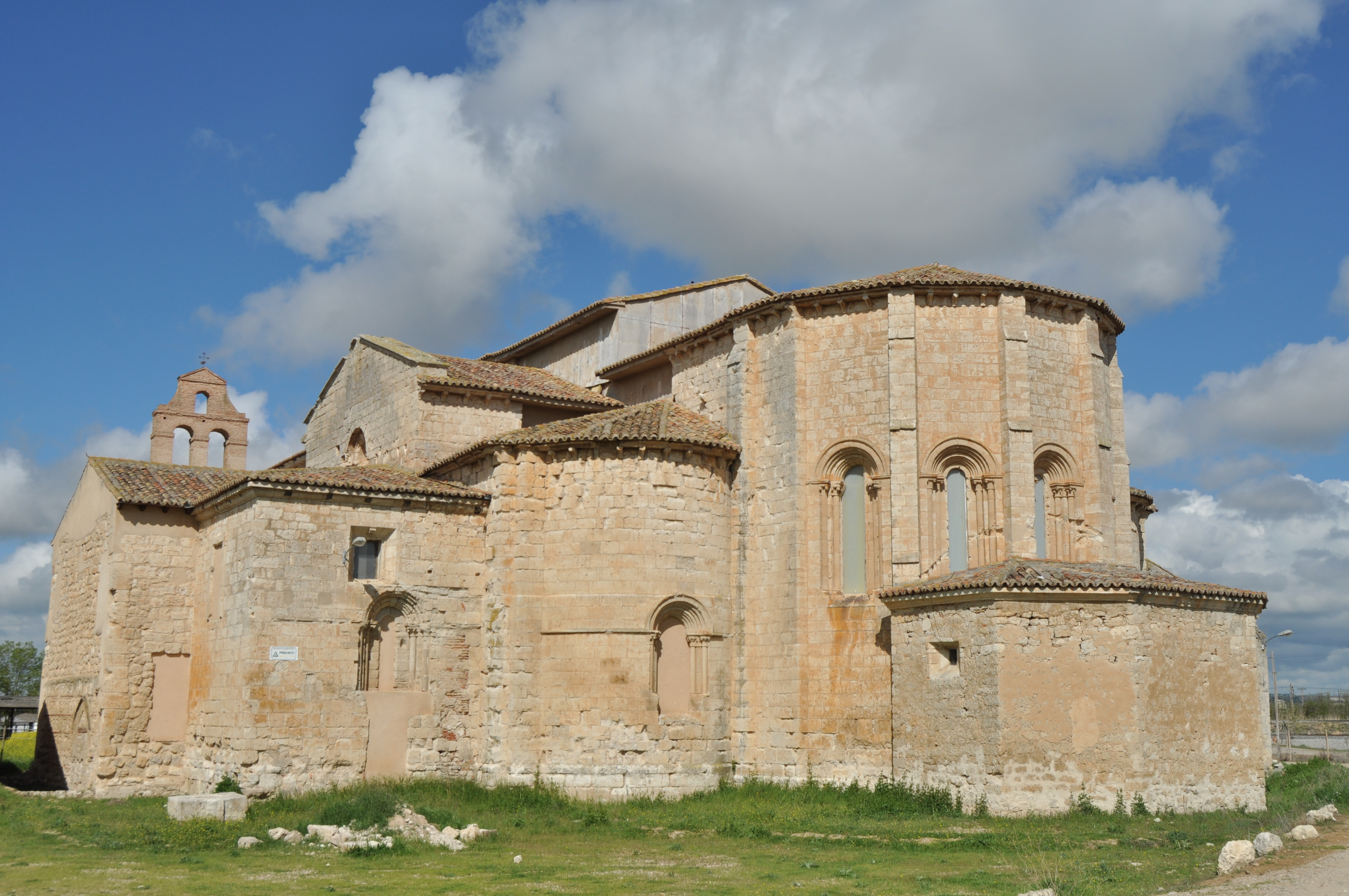 Monasterio de Santa Maria de Palazuelos (Corcos del Valle) - 002